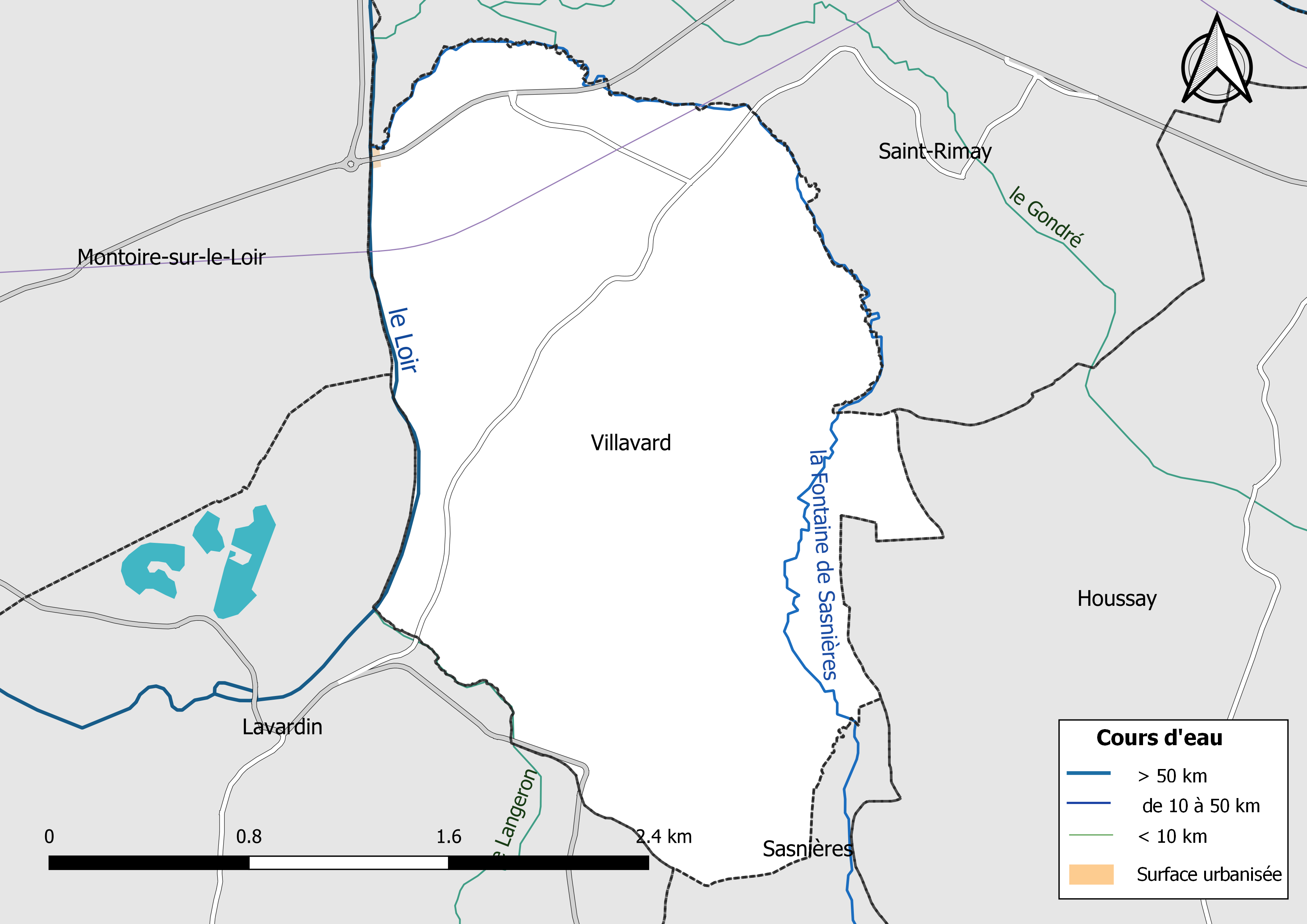 Carte du réseau hydrographique de la commune de Villavard (Loir-et-Cher, France).